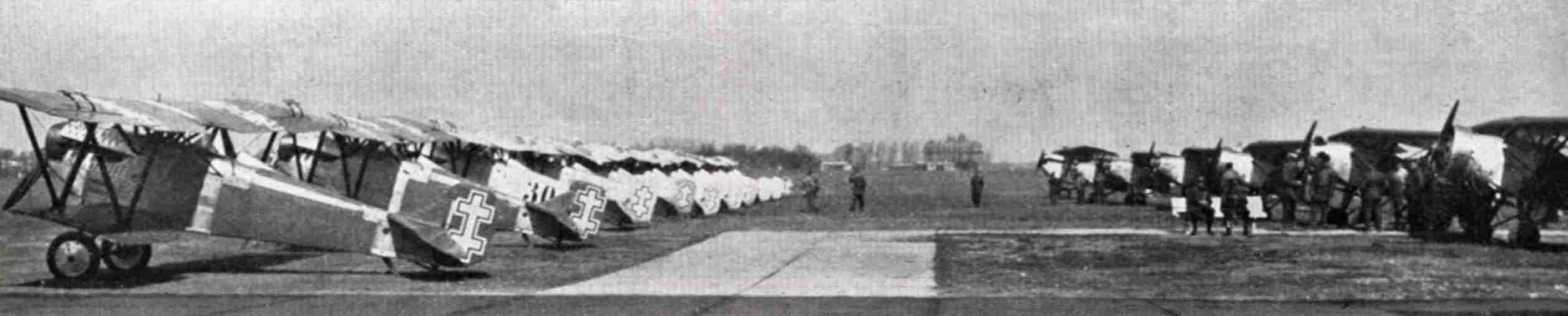 Lietuvos karo aviacijos lėktuvai Zokniuose 1937 m.